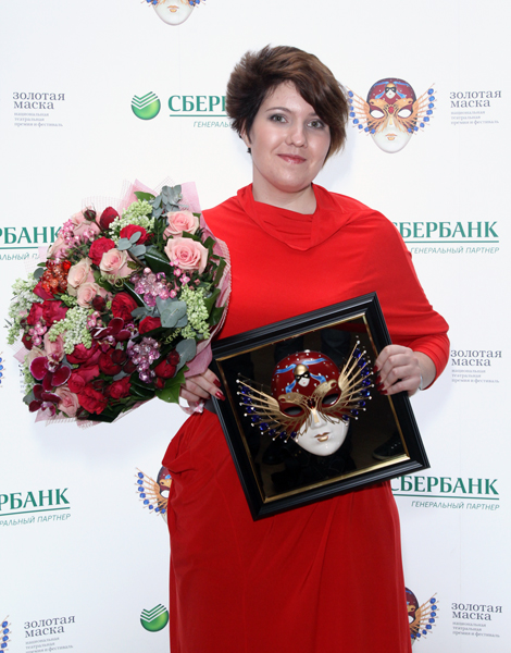 Надежда Кучер. "Золотая маска" 2013 года.